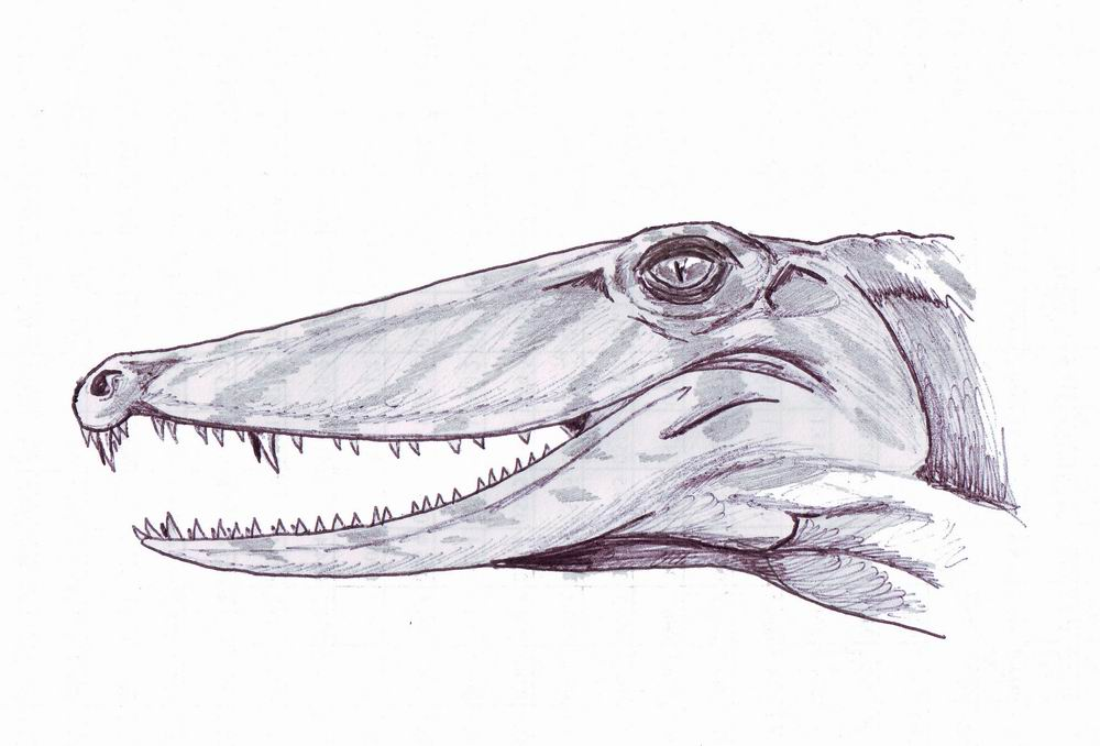 Secodontosaurus.jpg.